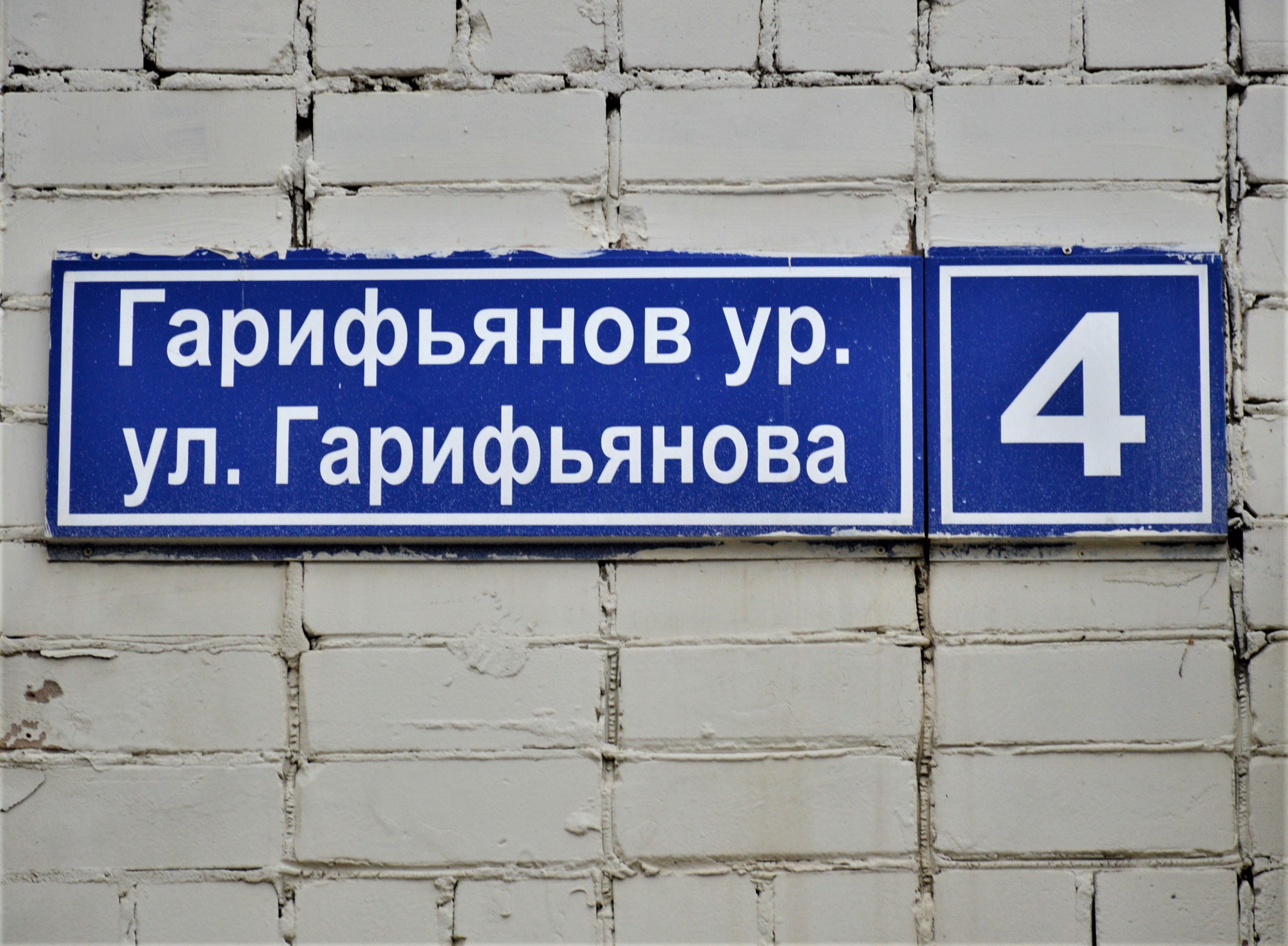 Казань, Горки. Адресная табличка на доме: ул. Гарифьянова, 4